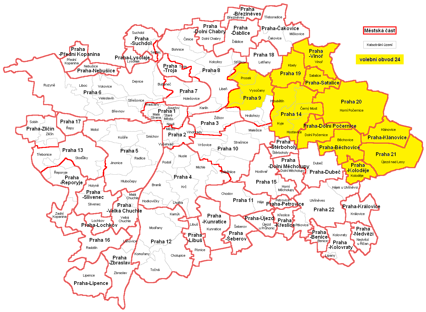 Mapa senátní obvod č. 24